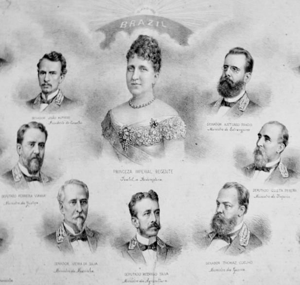 Gabinete que fez a Lei Aurea 1888.